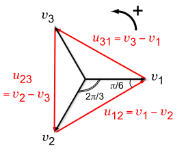 Vektorski prikaz faznih i međufaznih napona.